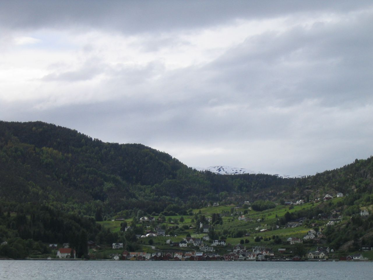 Solvorn